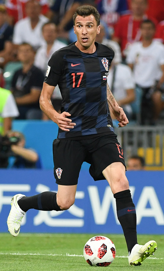 Сборная России заканчивает ЧМ-2018 с поднятой головой. Хорватия выходит в полуфинал